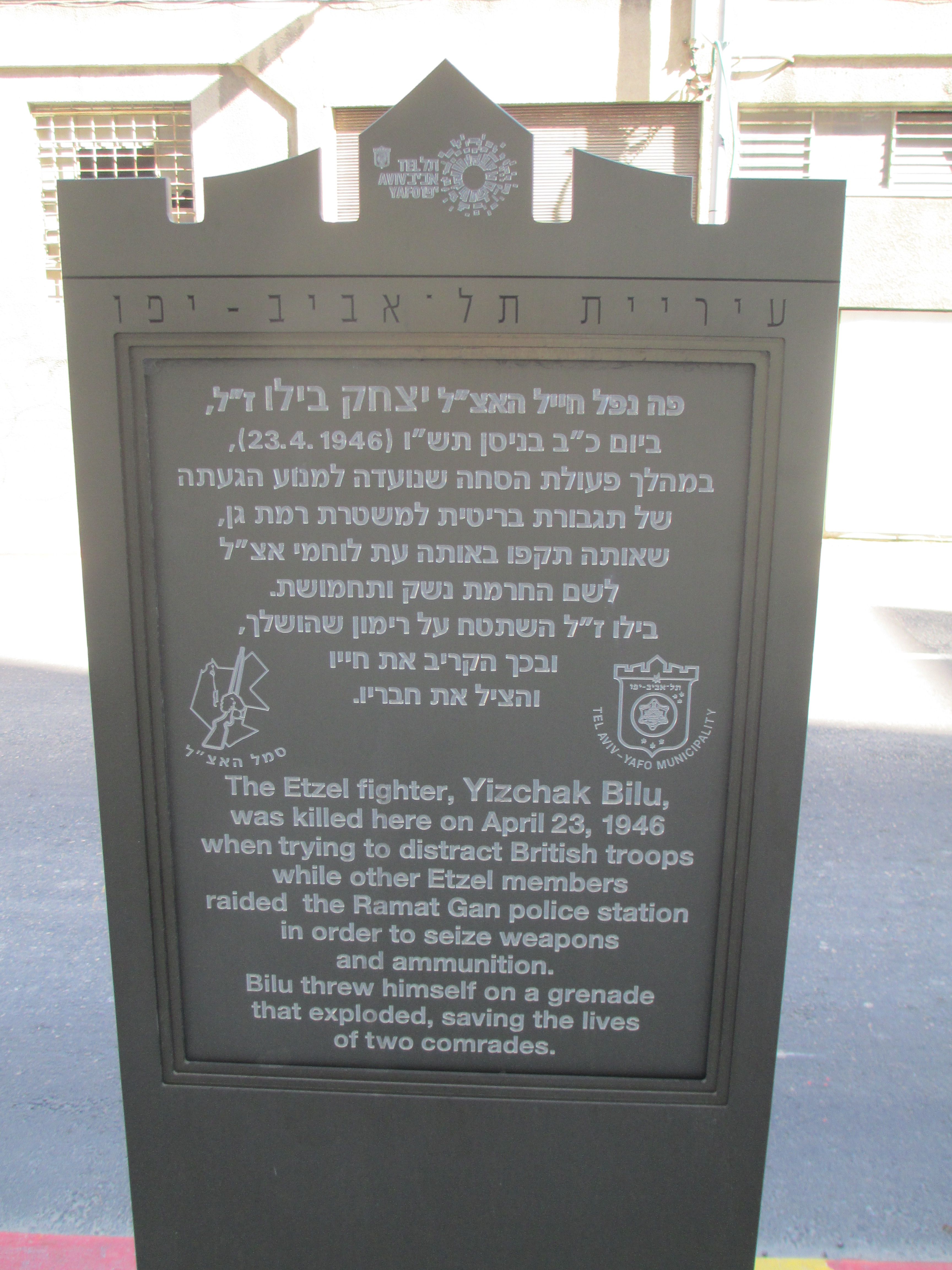 לוחית זיכרון ללוחם האצ"ל יצחק בילו שנפל במסגרת ההתקפה על משטרת רמת גן. רחוב הרכבת מול בניין המכס של תחנת הרכבת הישנה בתל אביב